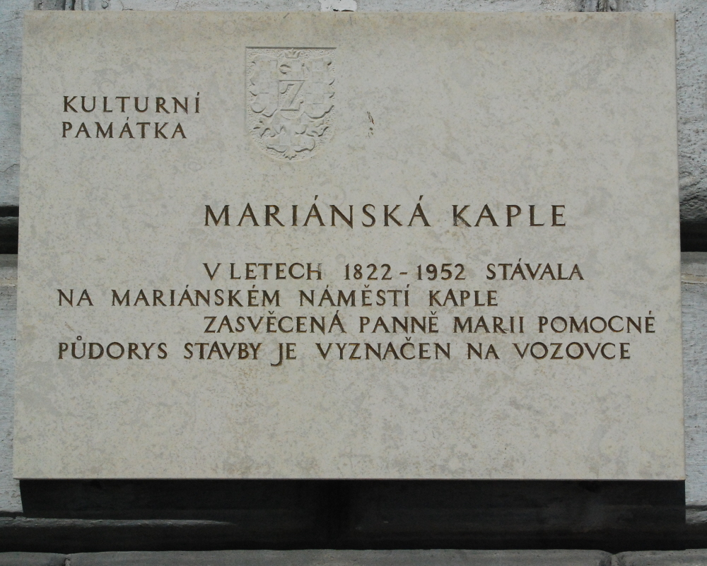 Hinweistafel auf die Mariahilf-Kapelle, die früher auf dem Marianske Namesti stand.